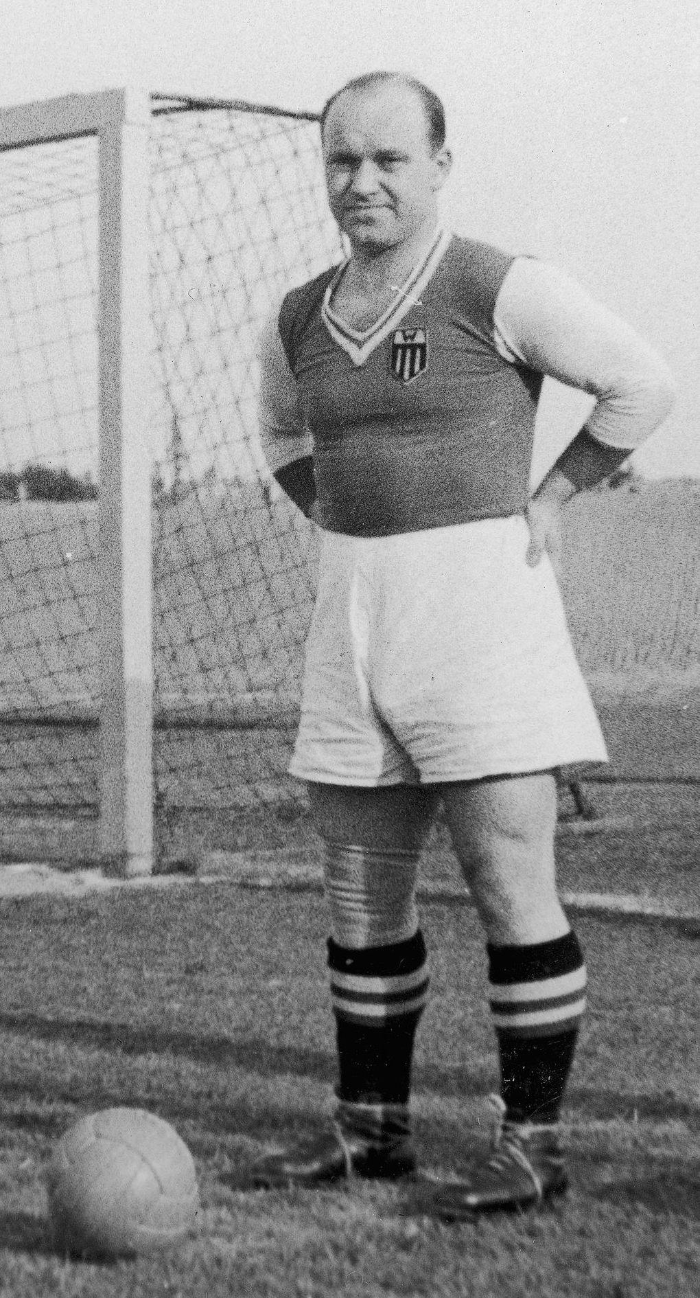 Henryk Martyna podczas wielkiej rewii asów sportu.